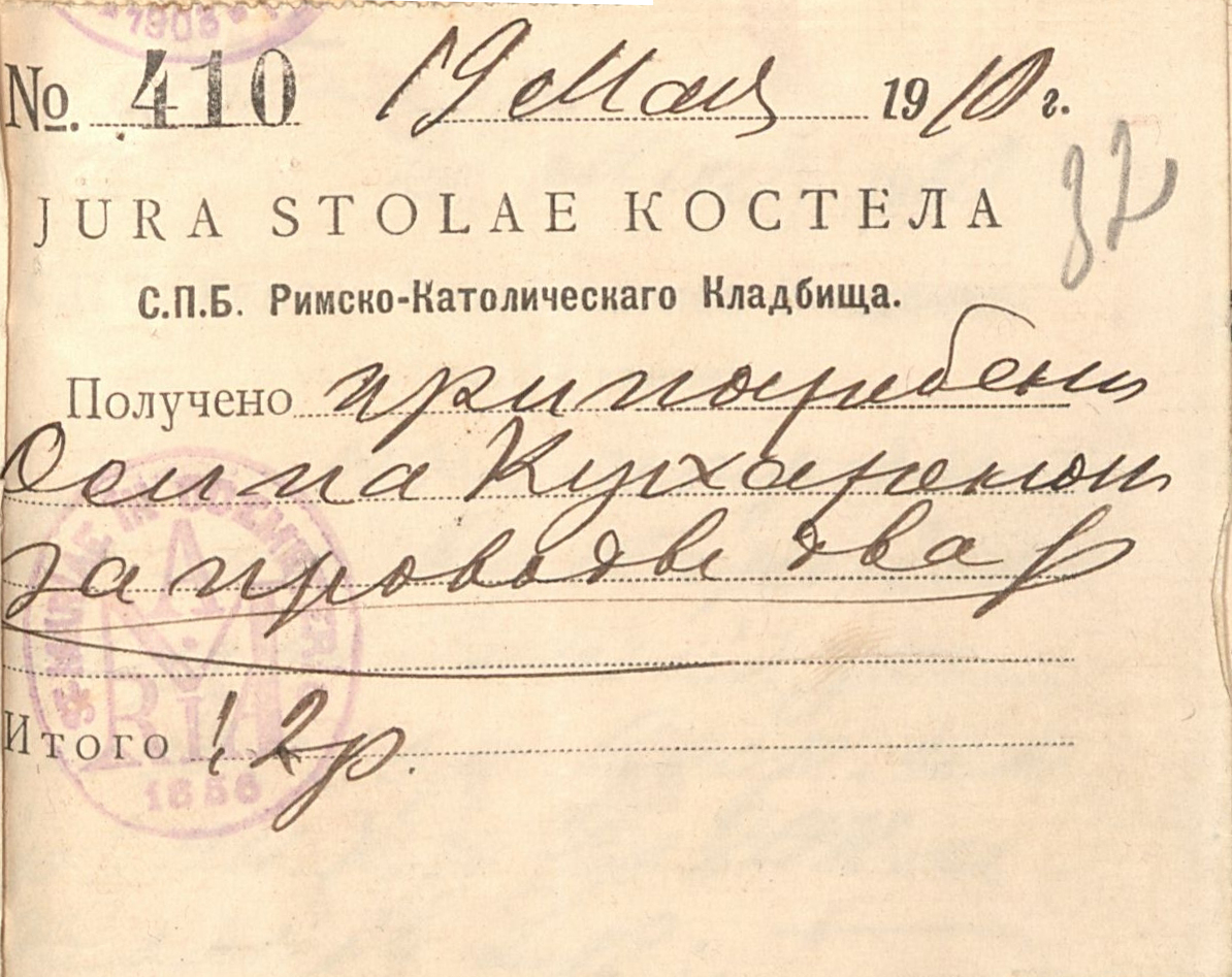 Квитанция костела Римско-католического кладбища, 1910